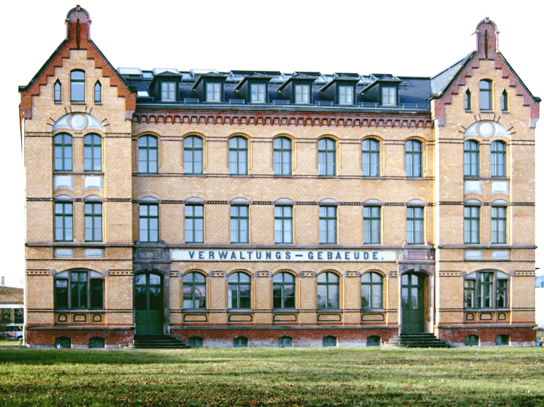 Verwaltungsgebäude des ehemaligen Schlachthof Magdeburg, Stadtteil Stadtfeld Ost